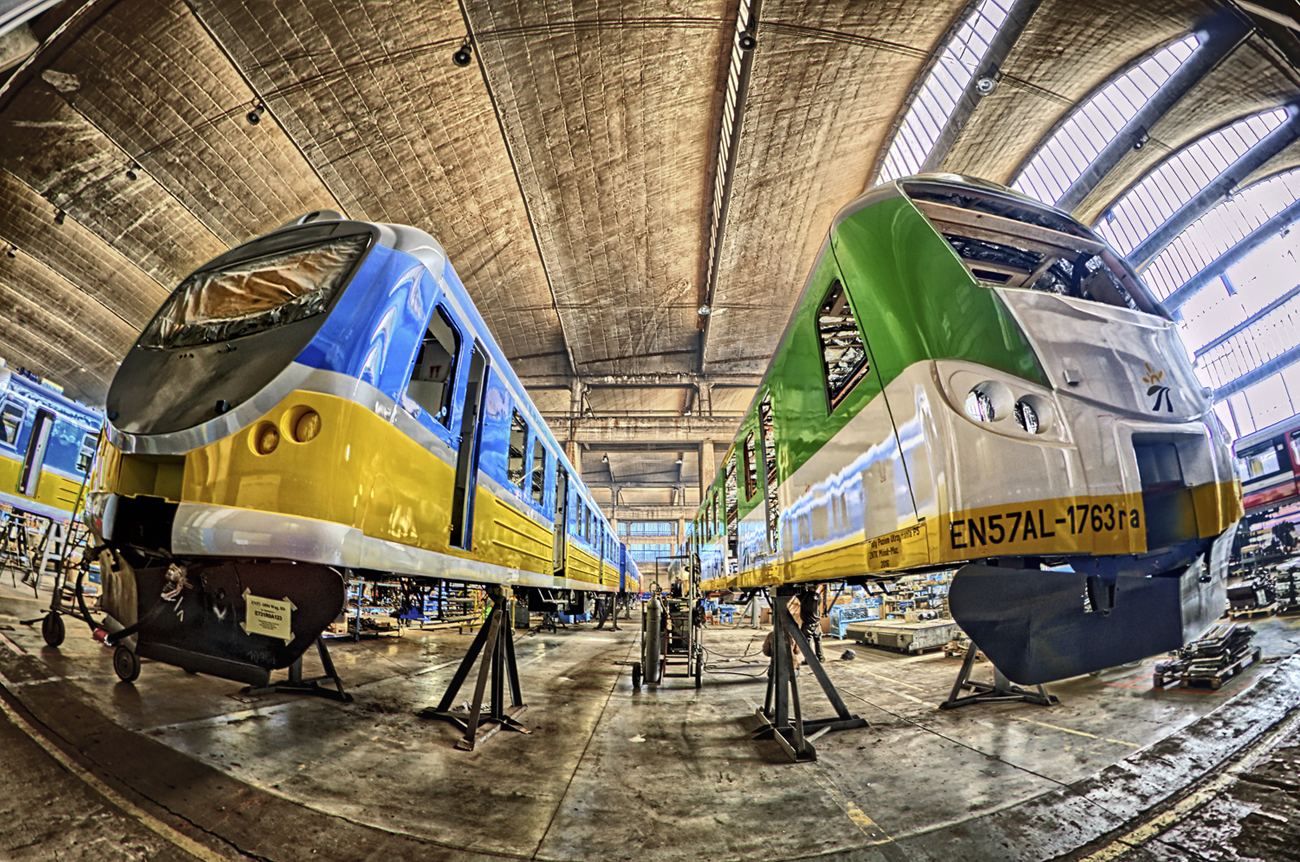 Elektryczny zespół trakcyjny EN57AKM-1094 należący do SKM Trójmiasto i EN57AL-1763 należący do Kolei Mazowieckich podczas modernizacji w ZNTK Mińsk Mazowiecki. Z prawej widoczny elektryczny zespół trakcyjny Alstom Metropolis 98B należący do Metra Warszawskiego w trakcie naprawy głównej.